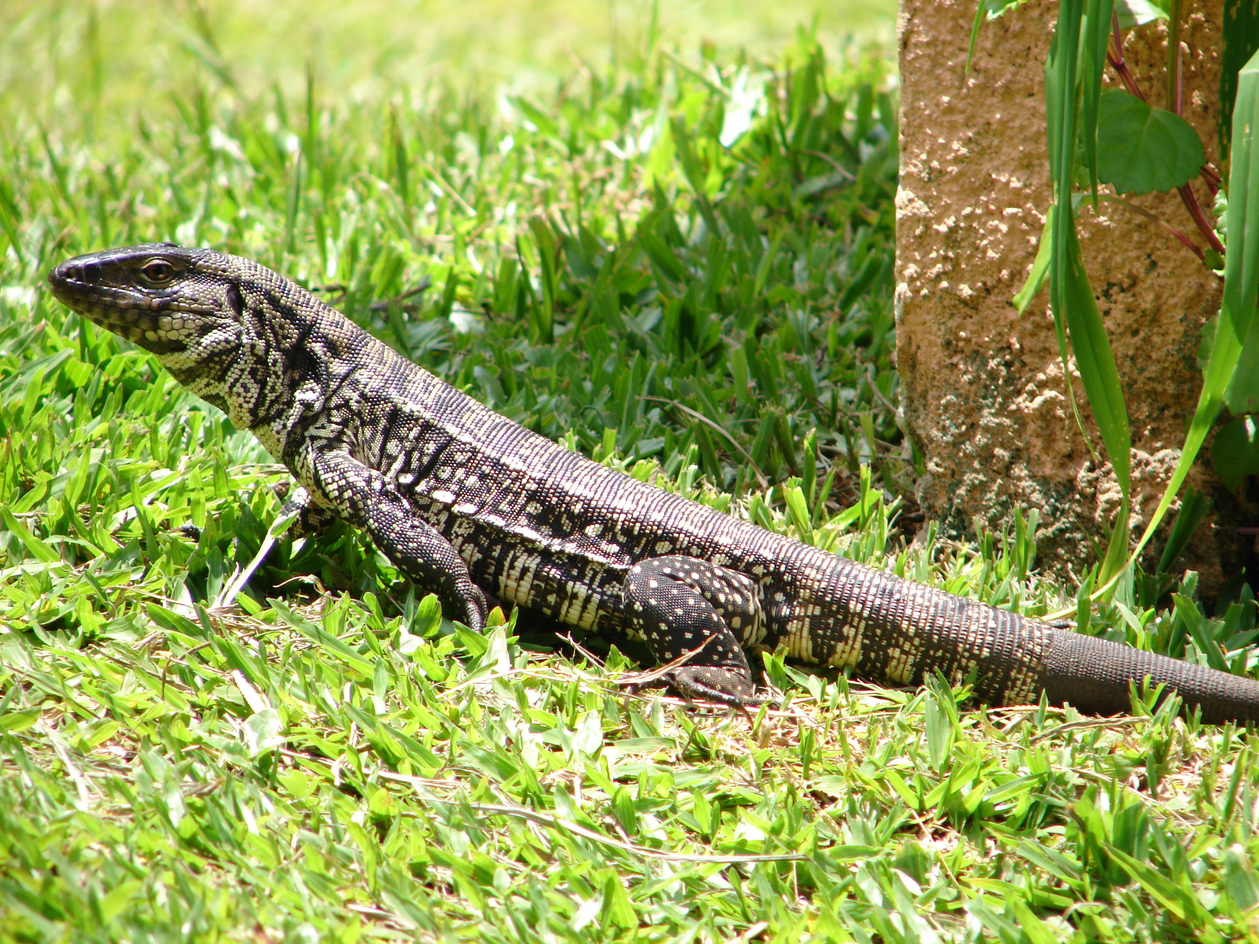 popular lagarto de marau rs